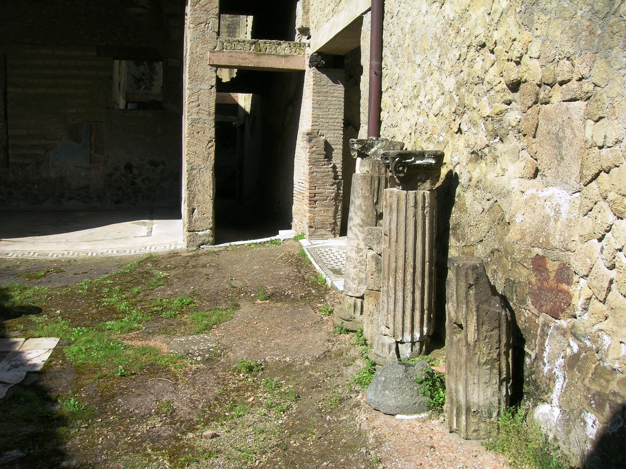 Casa del Colonnato Tuscanico